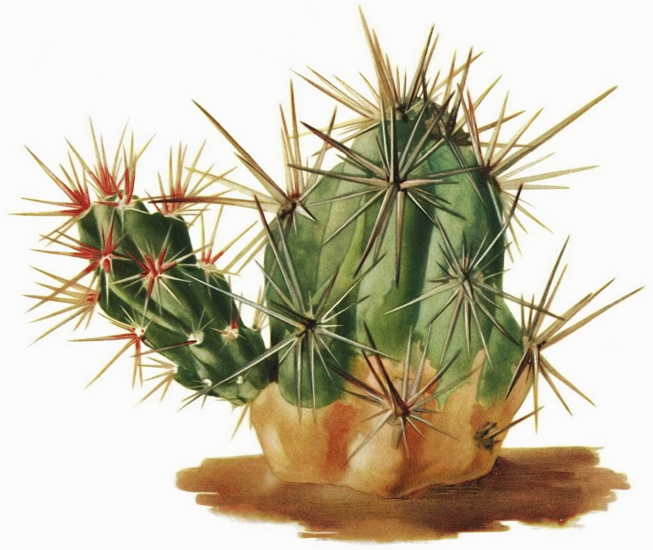 1. Miqueliopuntia miquelii, 2. Grusonia invicta, 3. Cumulopuntia ignescens.